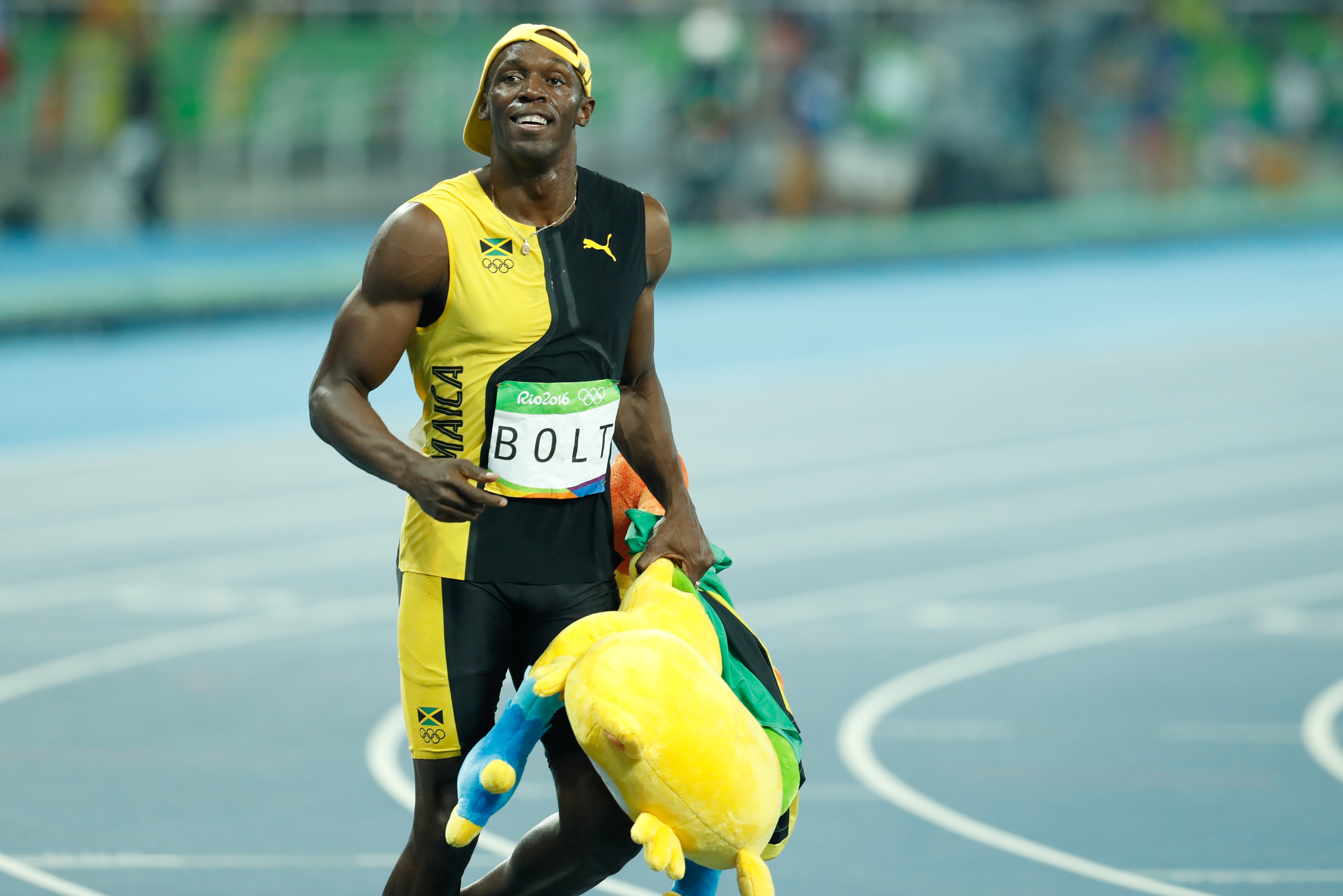 Rio de Janeiro - O jamaicano Usain Bolt, garantiu o ouro e fez história ao conquistar pela terceira vez o título de homem mais rápido do mundo nos 100 metros rasos em uma Olimpíada (Fernando Frazão/Agência Brasil).